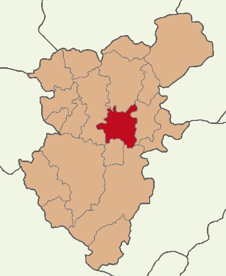 Honaz ilçesinin konumu